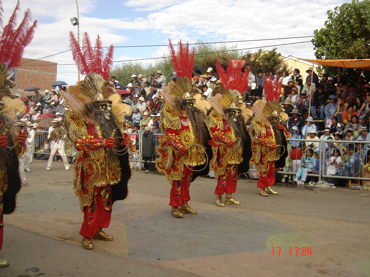 Het Carnaval van Oruro, Bolivia, het staat sinds 2001 vermeld op de Lijst van Meesterwerken van het Orale en Immateriële Erfgoed van de Mensheid van UNESCO.